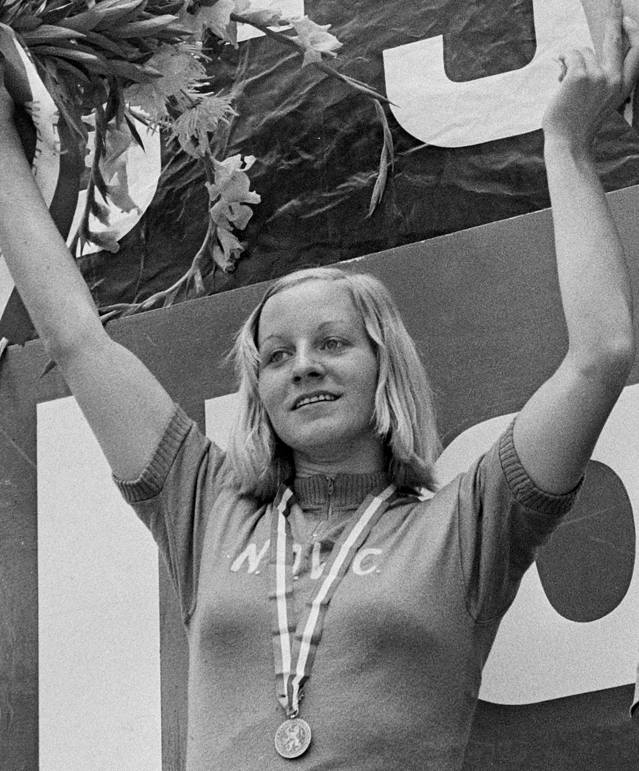 Nationale wielerkampioenschappen voor dames; Minnie Brinkhof-Nieuwenhuis (2e)